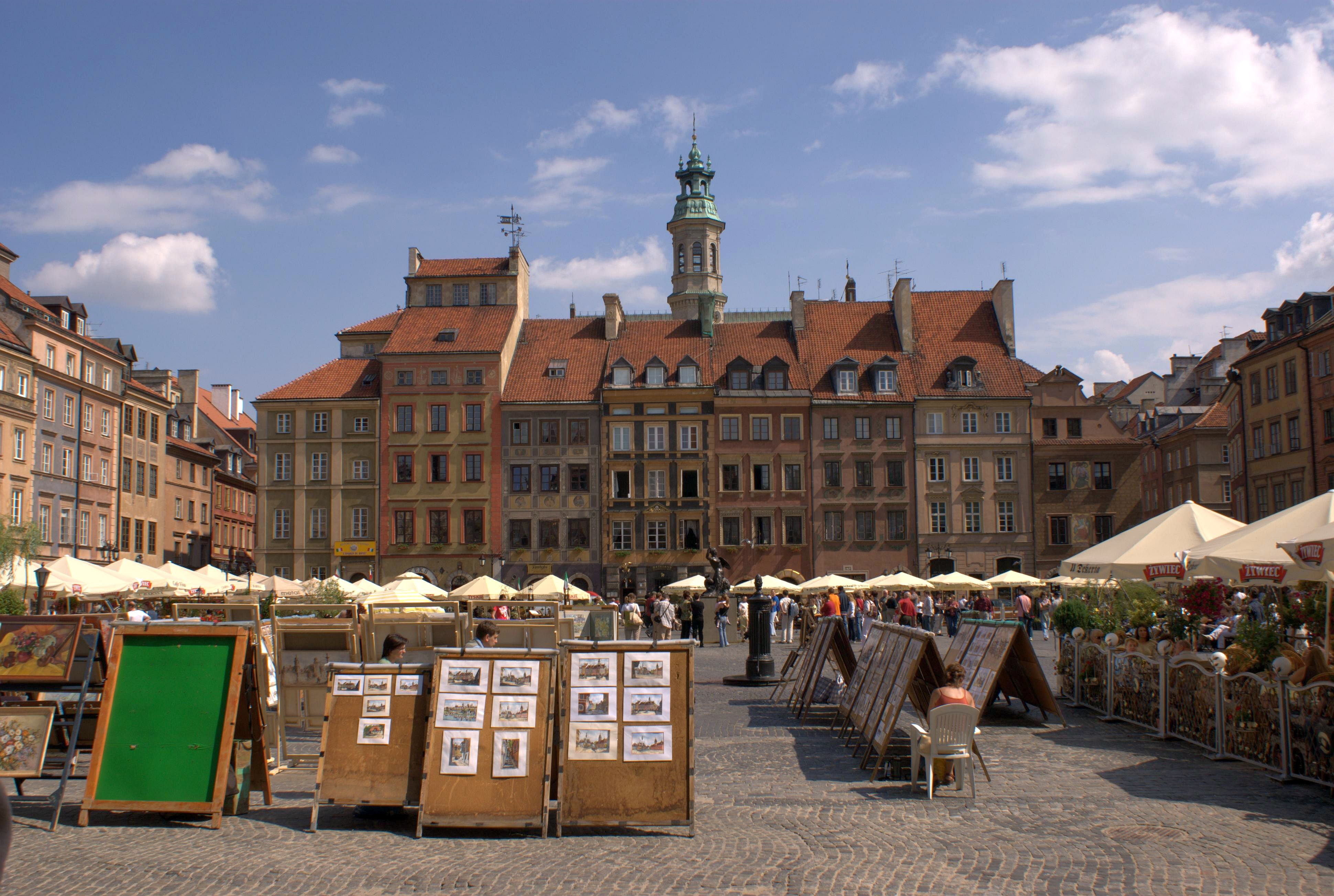 Rynek Starego Miasta w Warszawie, Strona Zakrzewskiego (Zamkowa)